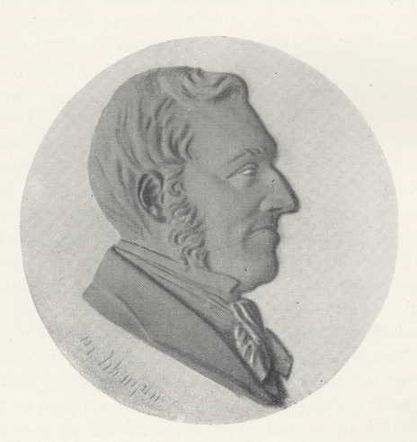 Bildnis Karl Robert Klempin (1816–1874)